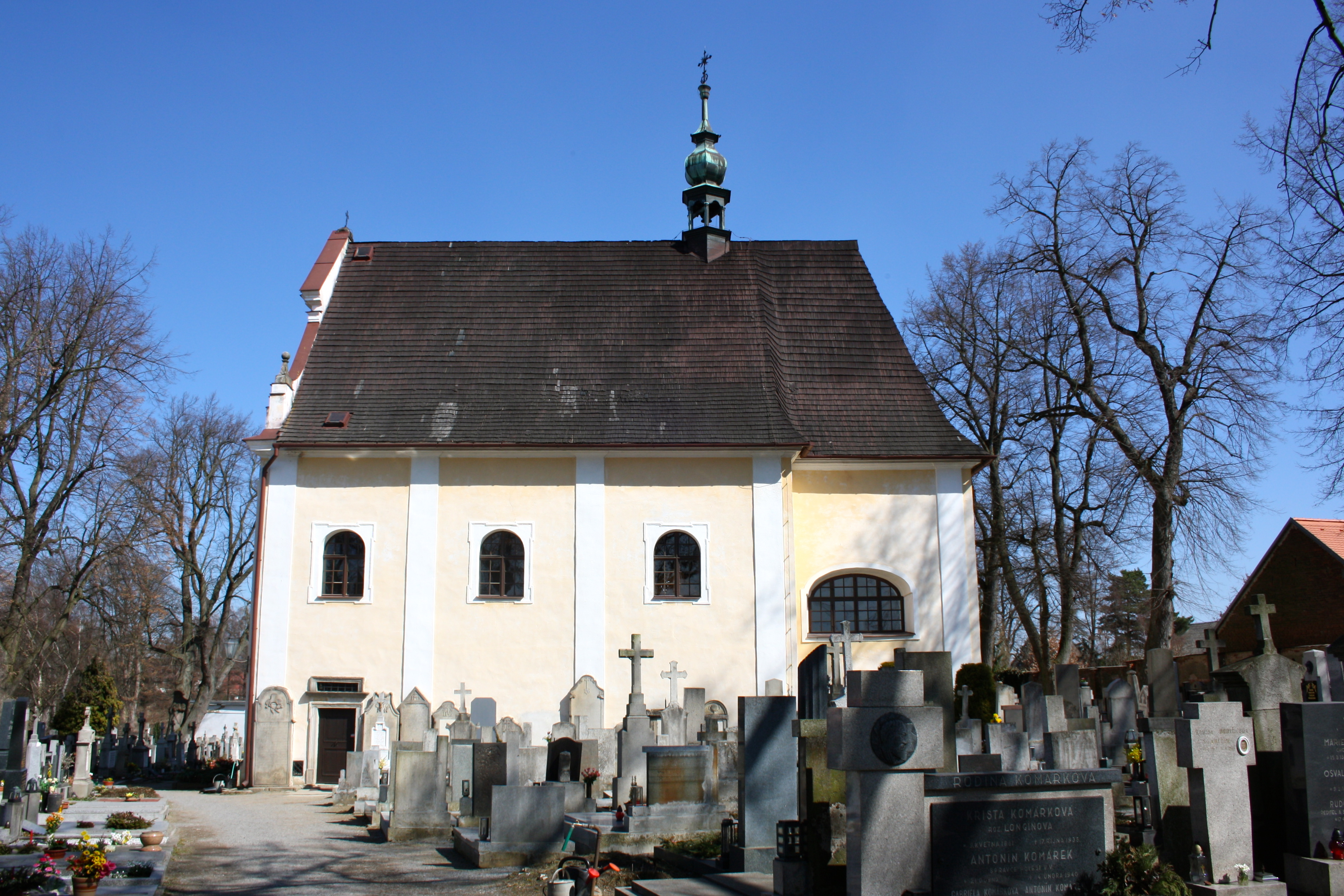 Kostel sv. Anny (Telč), Svatoanenská, Masarykova, Telč